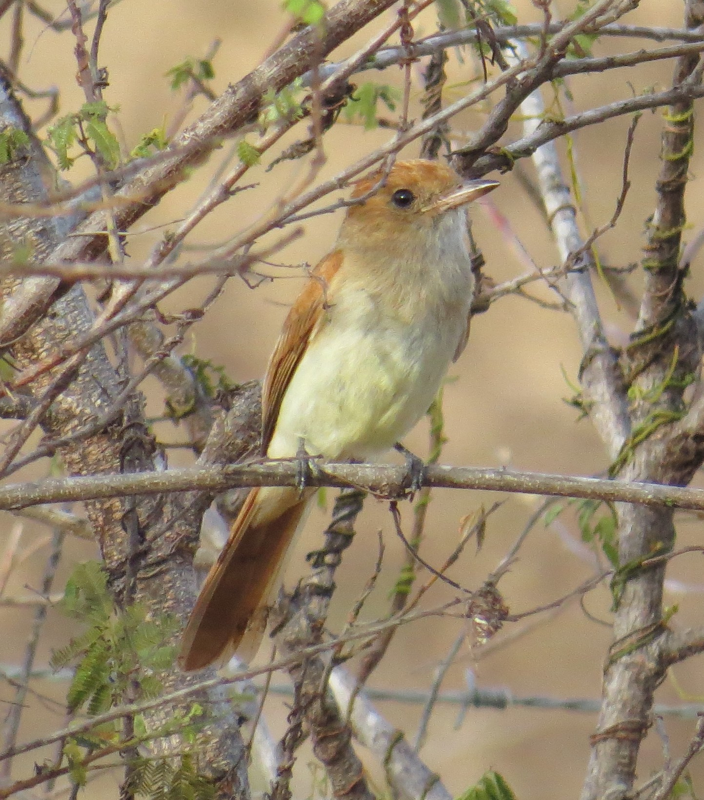 Casiornis fuscus Portuguese name: caneleiro-enxofre English name: Ash-throated casiornis